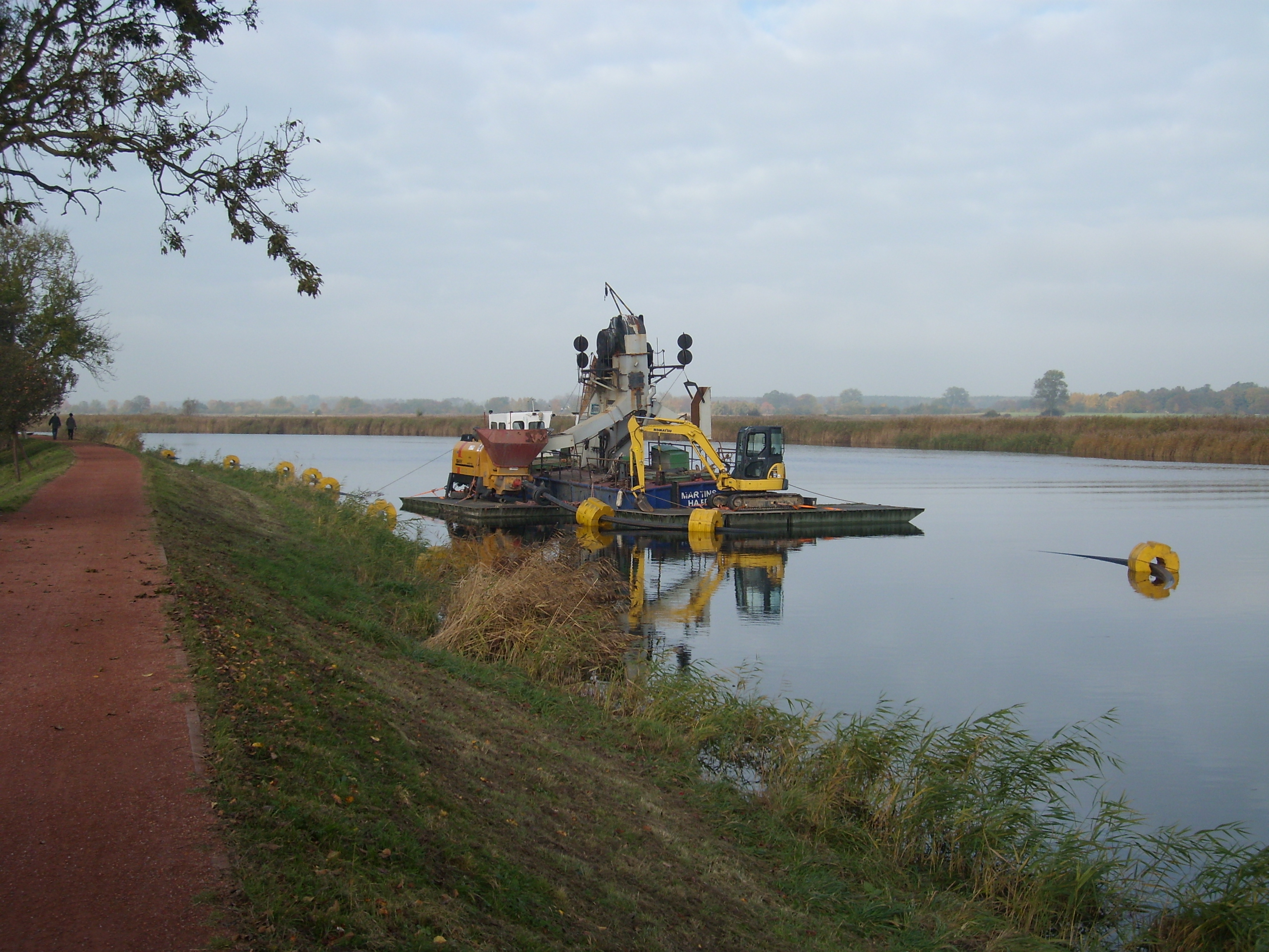 Die Fahrrinne des Ryck soll wieder auf 4 m vertieft werden. Hierzu wird der Baggeraushub aus der Fahrrinne über eine Druckleitung auf das Spülfeld am Ryckwäldchen gepumpt.